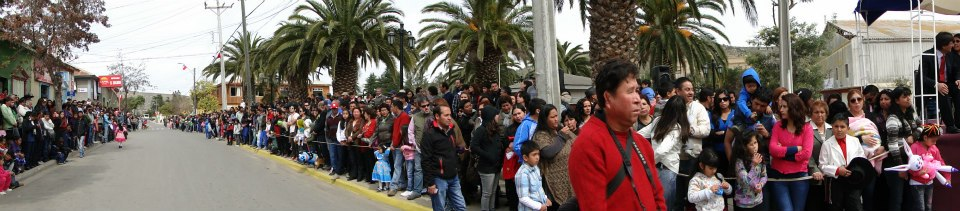 DESFILE 18 SEPTIEMBRE CANELA